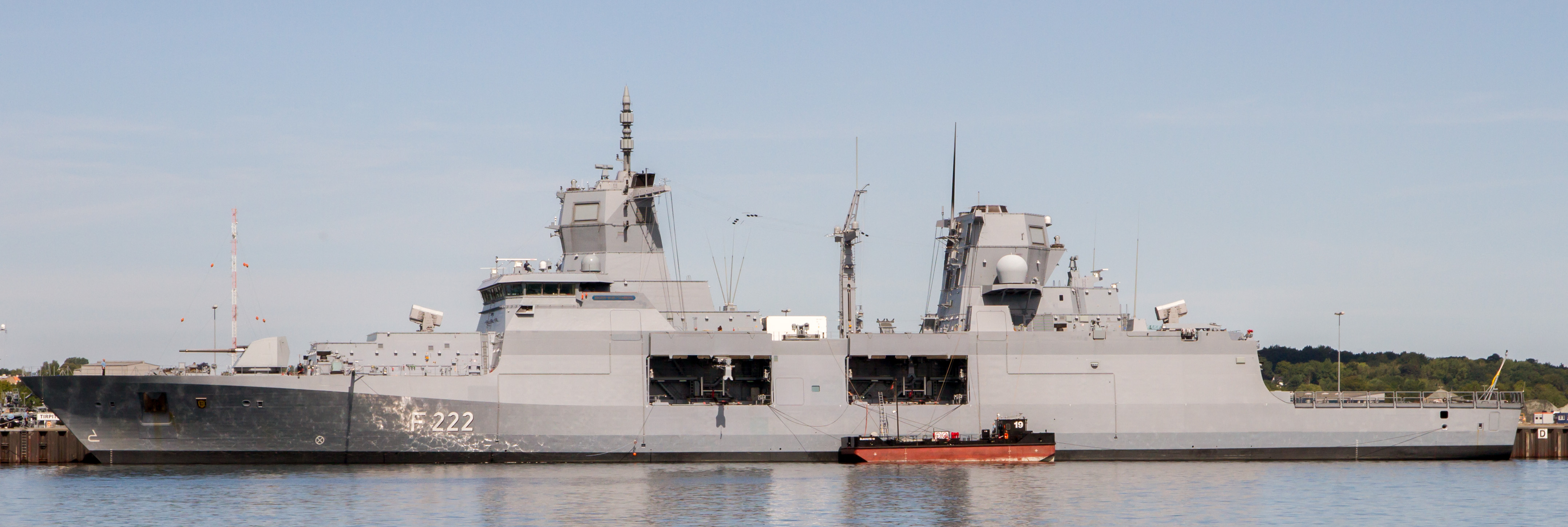 Fregatte F222 Baden-Württemberg in Kiel